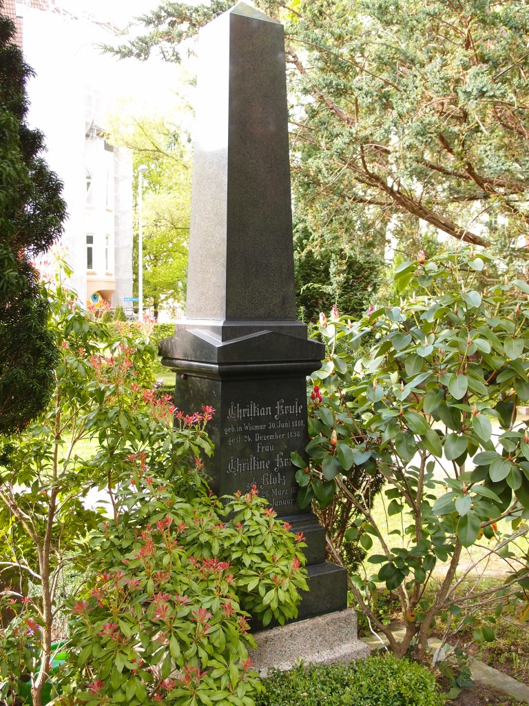 Grab des Politikers Christian Kruse (1818-1898) auf dem Südfriedhof in Kiel.